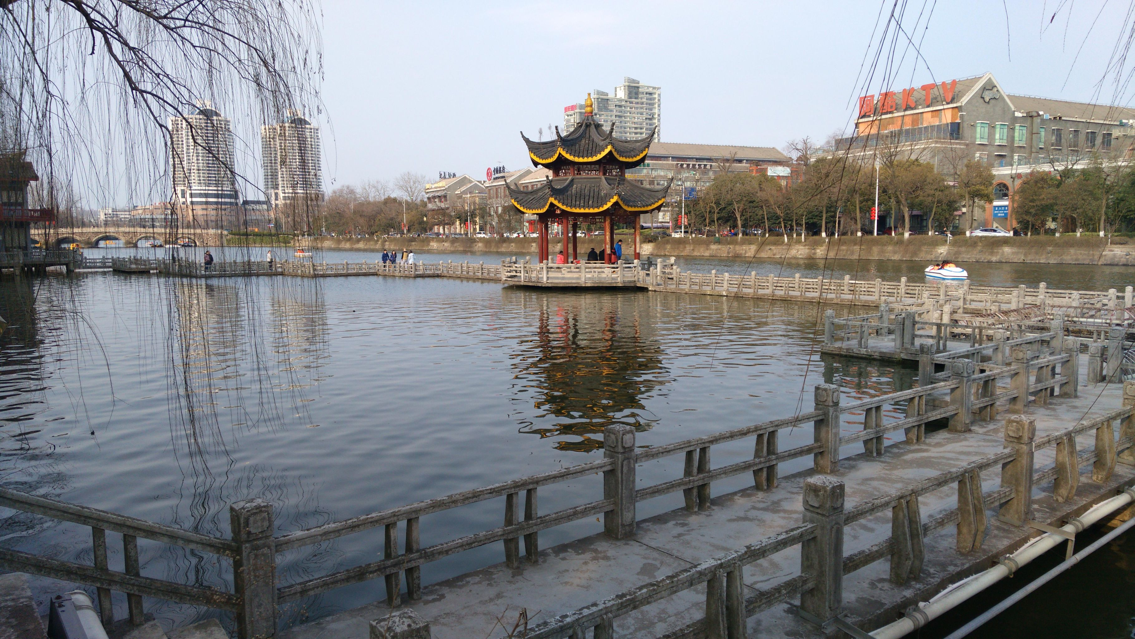 Chongchuan, Nantong, Jiangsu, China